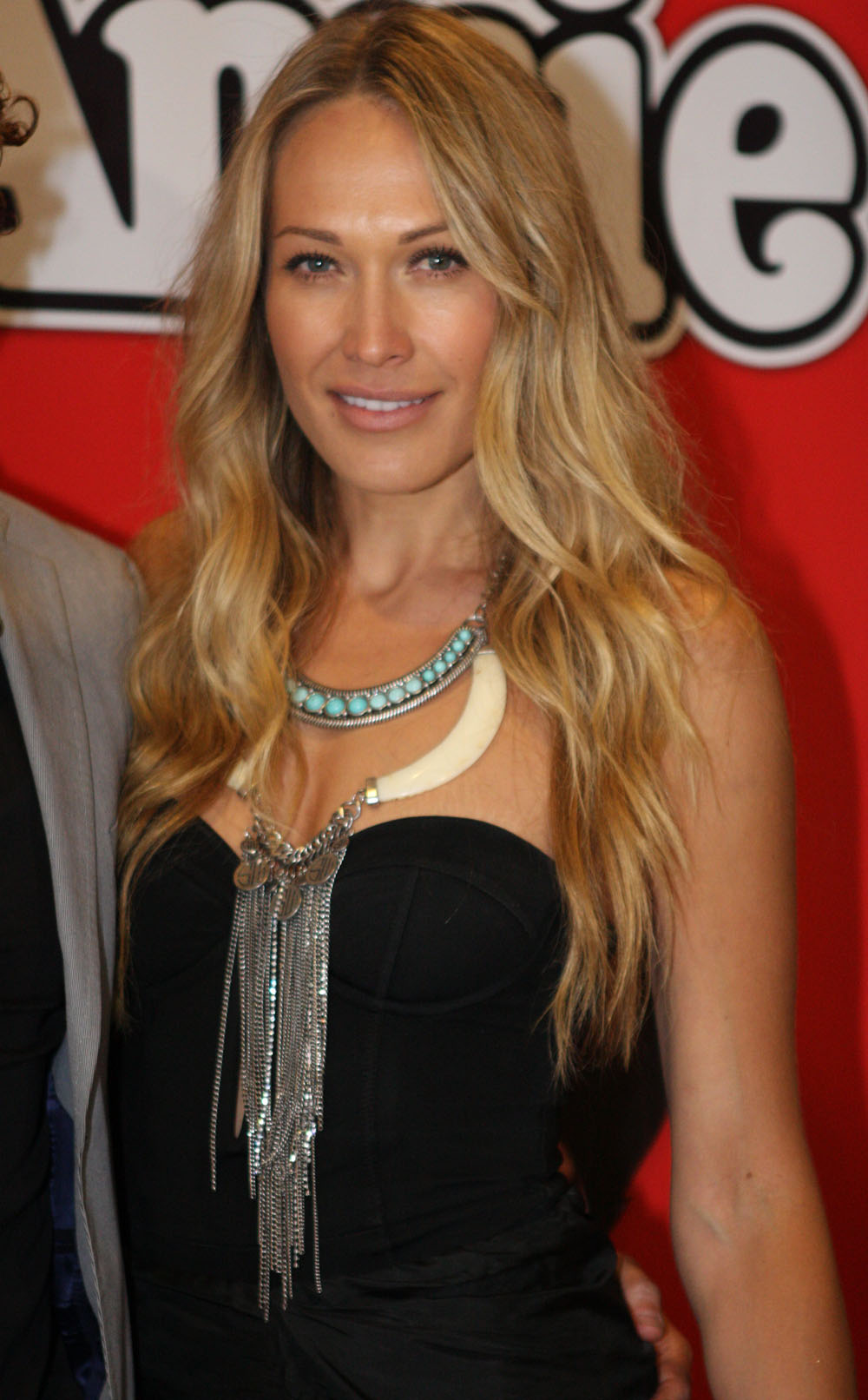 Erika Heynatz